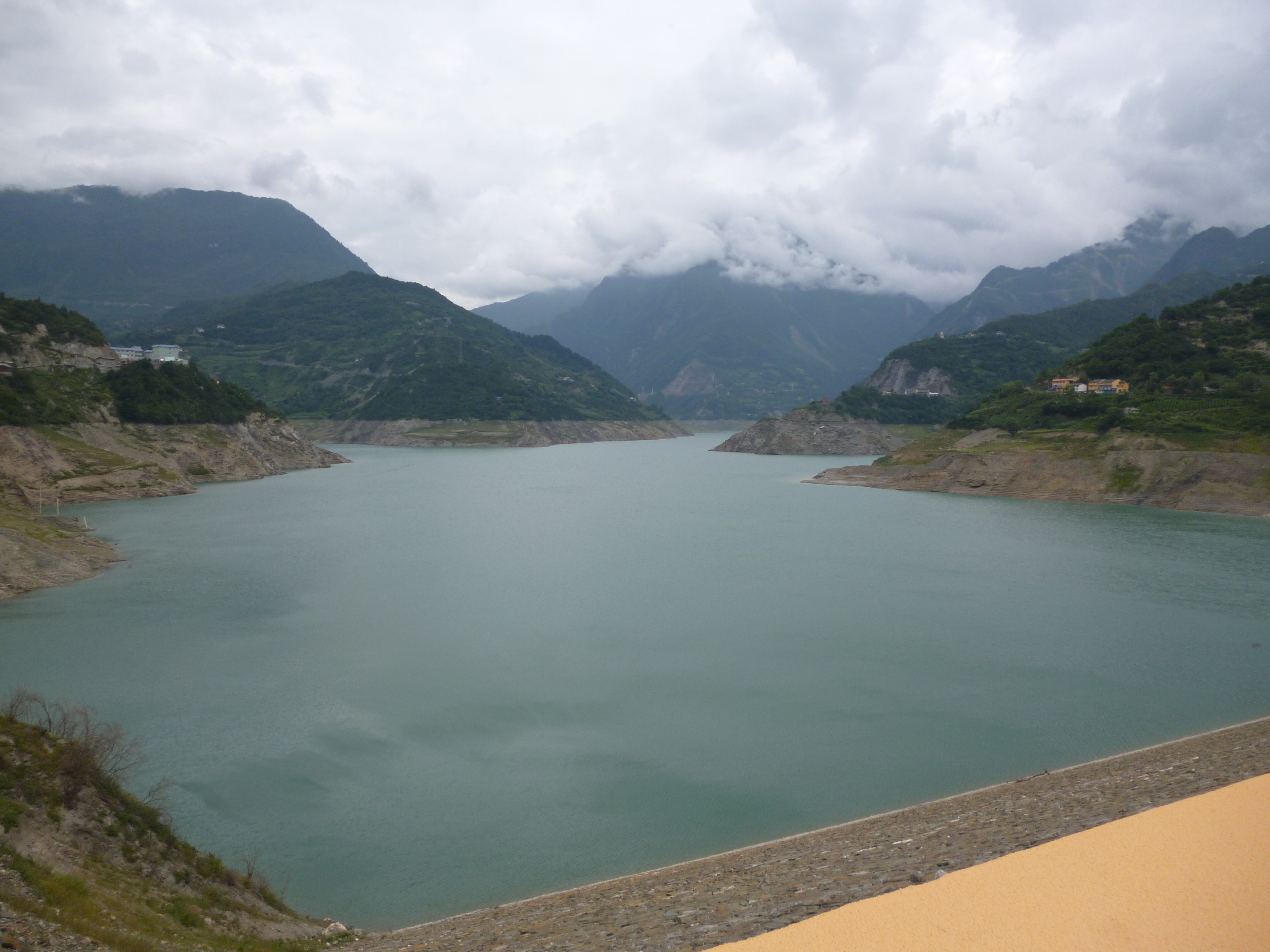 中文（中国大陆）: 硗碛湖水电站